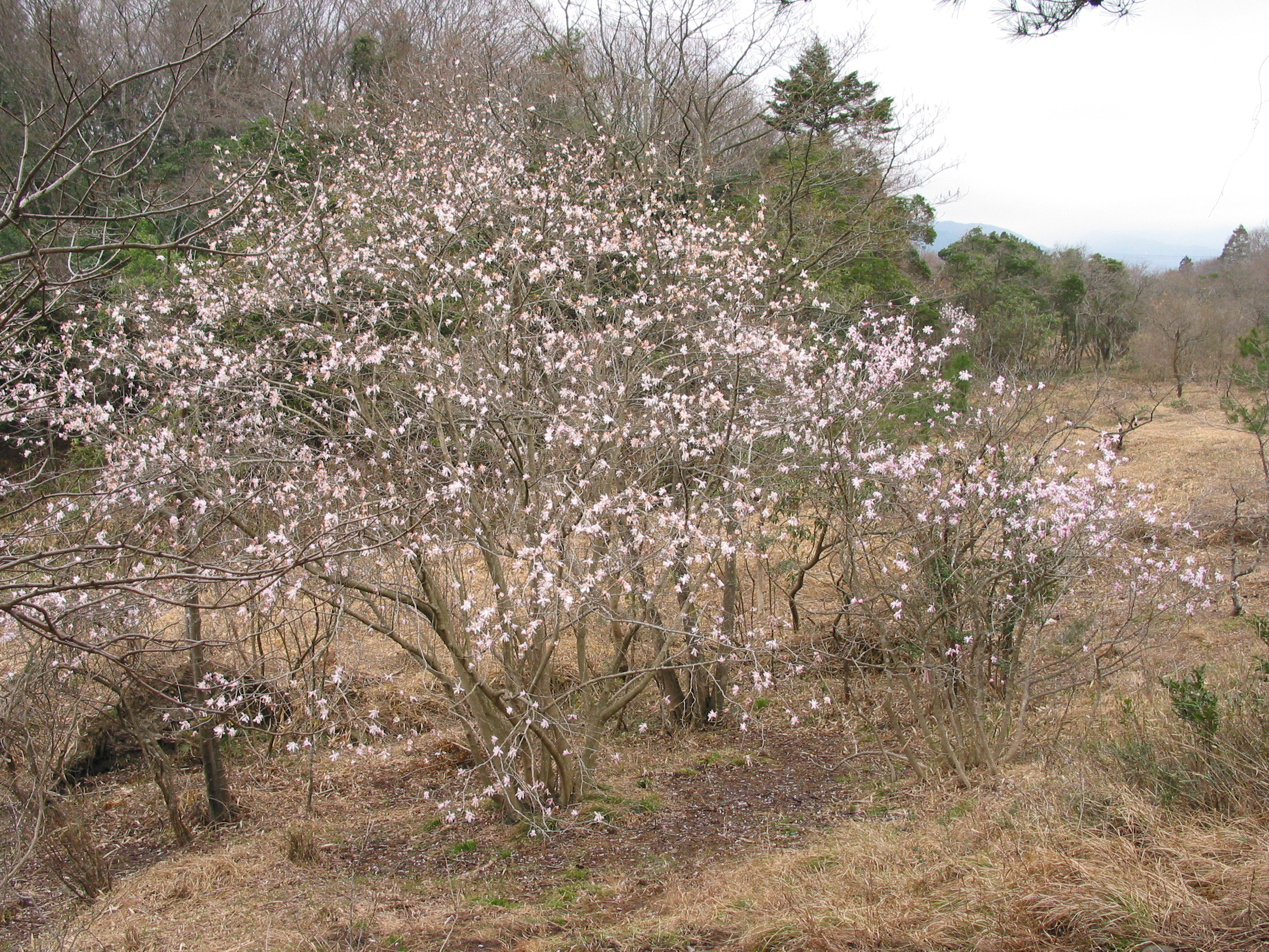 Magnolia stellata at Tabika (Natural monument of Japan), Komono, Mie, Mie, Japan